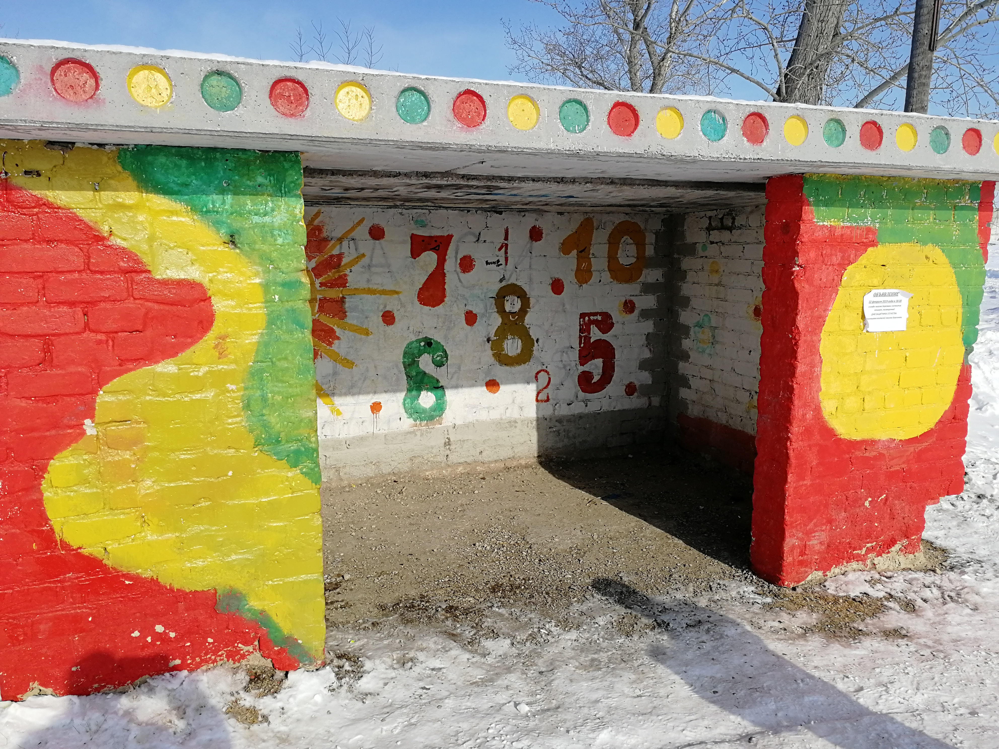 Остановка в поселке Берязники